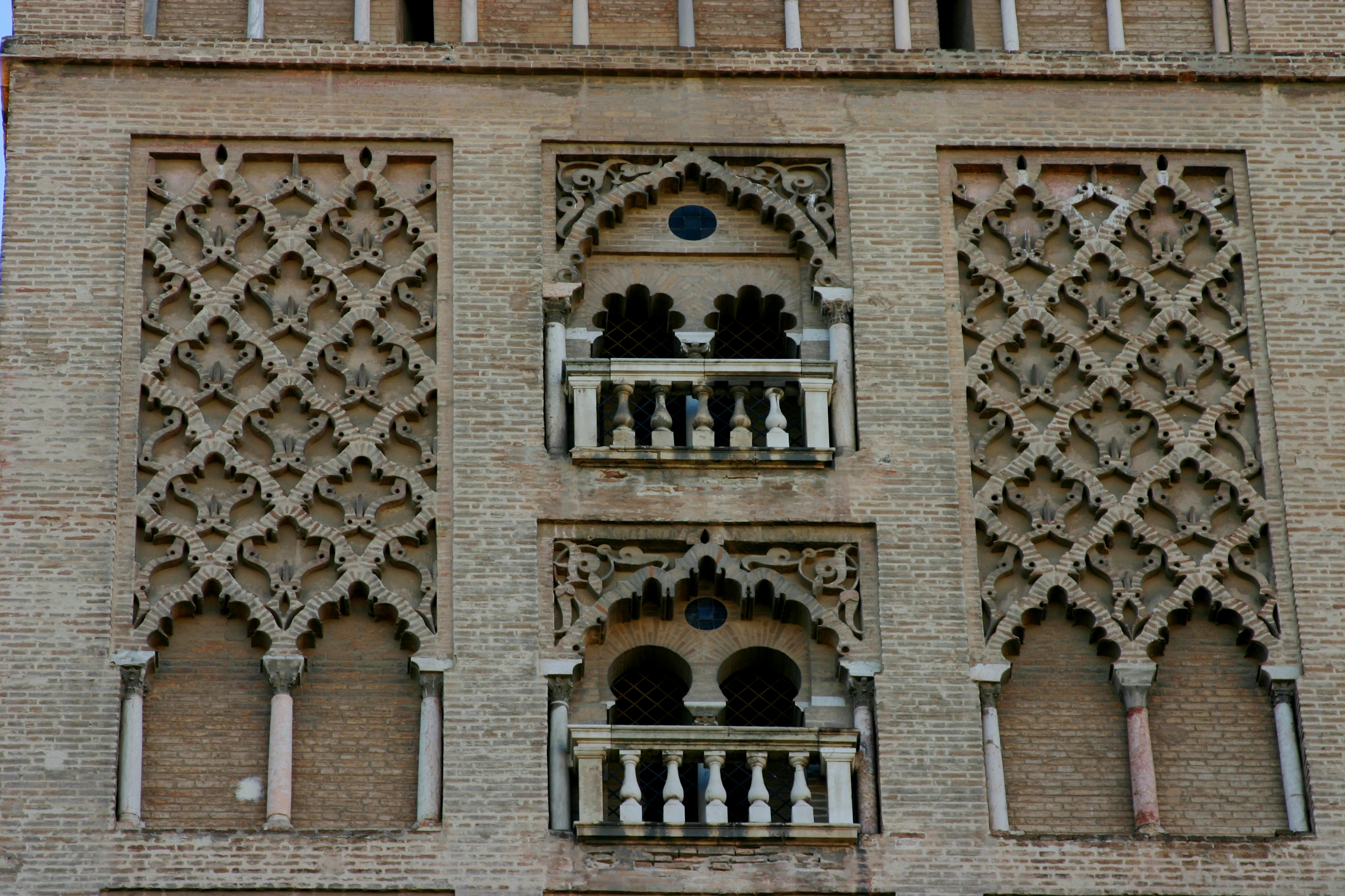 Janelas da Giralda